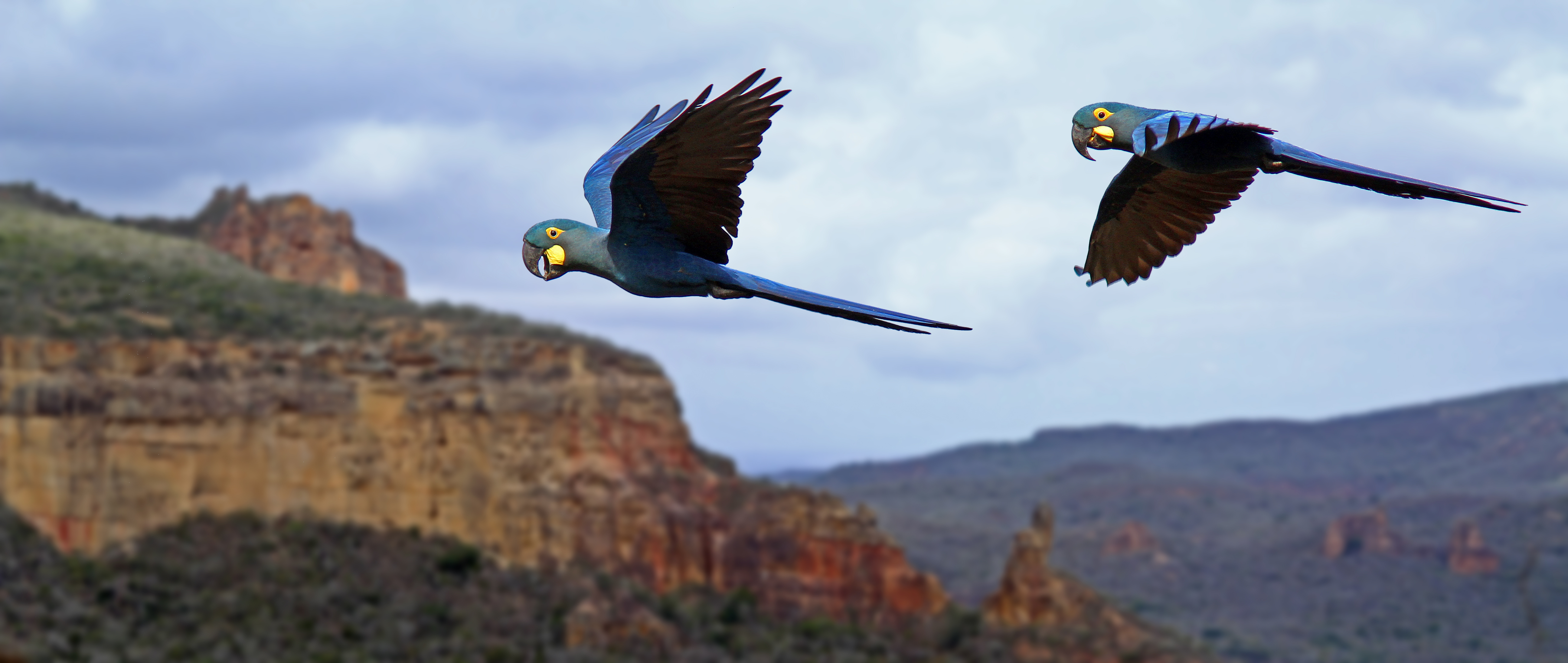 As araras-azuis-de-lear fazem parte do patrimônio natural brasileiro, exclusivos da Caatinga nordestina. Estão ameaçadas de extinção e só ocorrem nessa região da Bahia. Fazem ninho nos paredões de arenito do Raso da Catarina, e todo fim de tarde promovem um espetáculo de revoada para seus dormitórios.